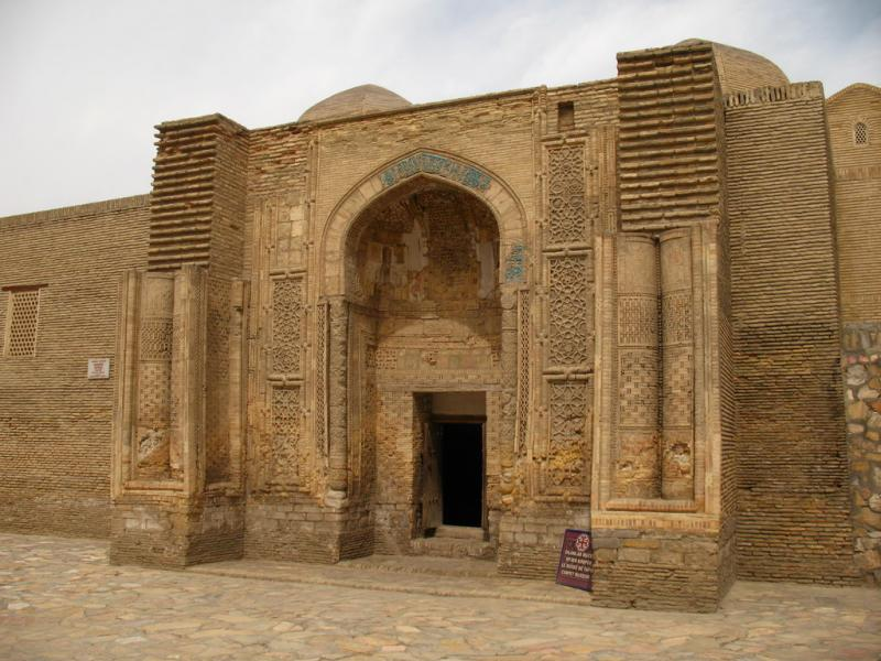 IMG_0270 Bukhara, Uzbekistan